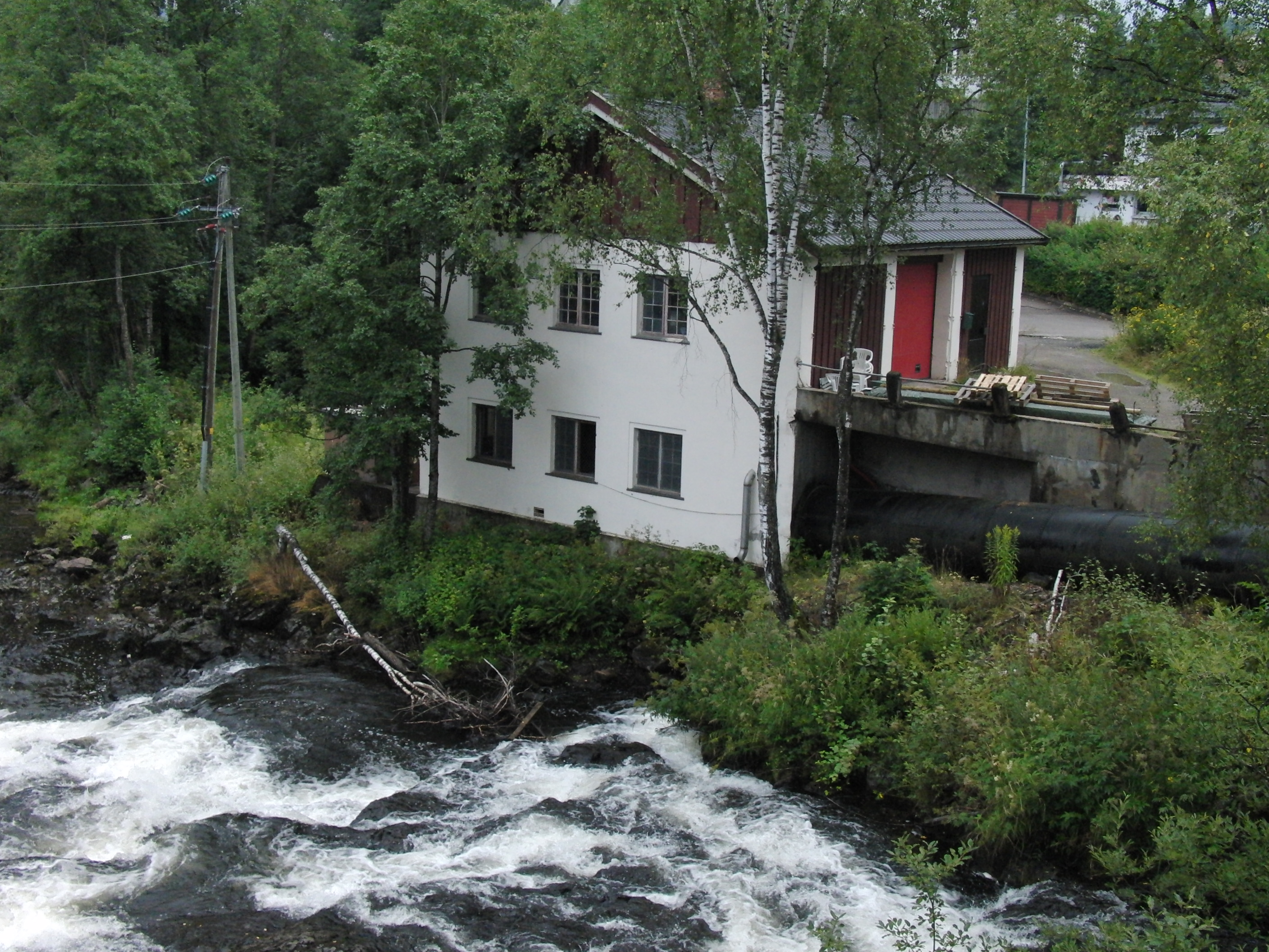 Rotnes Bruk kraftverk